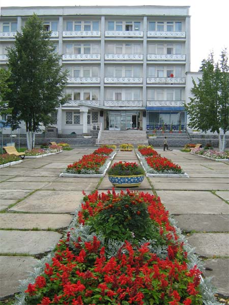 База отдыха "Трубник" Северского трубного завода, село Курганово